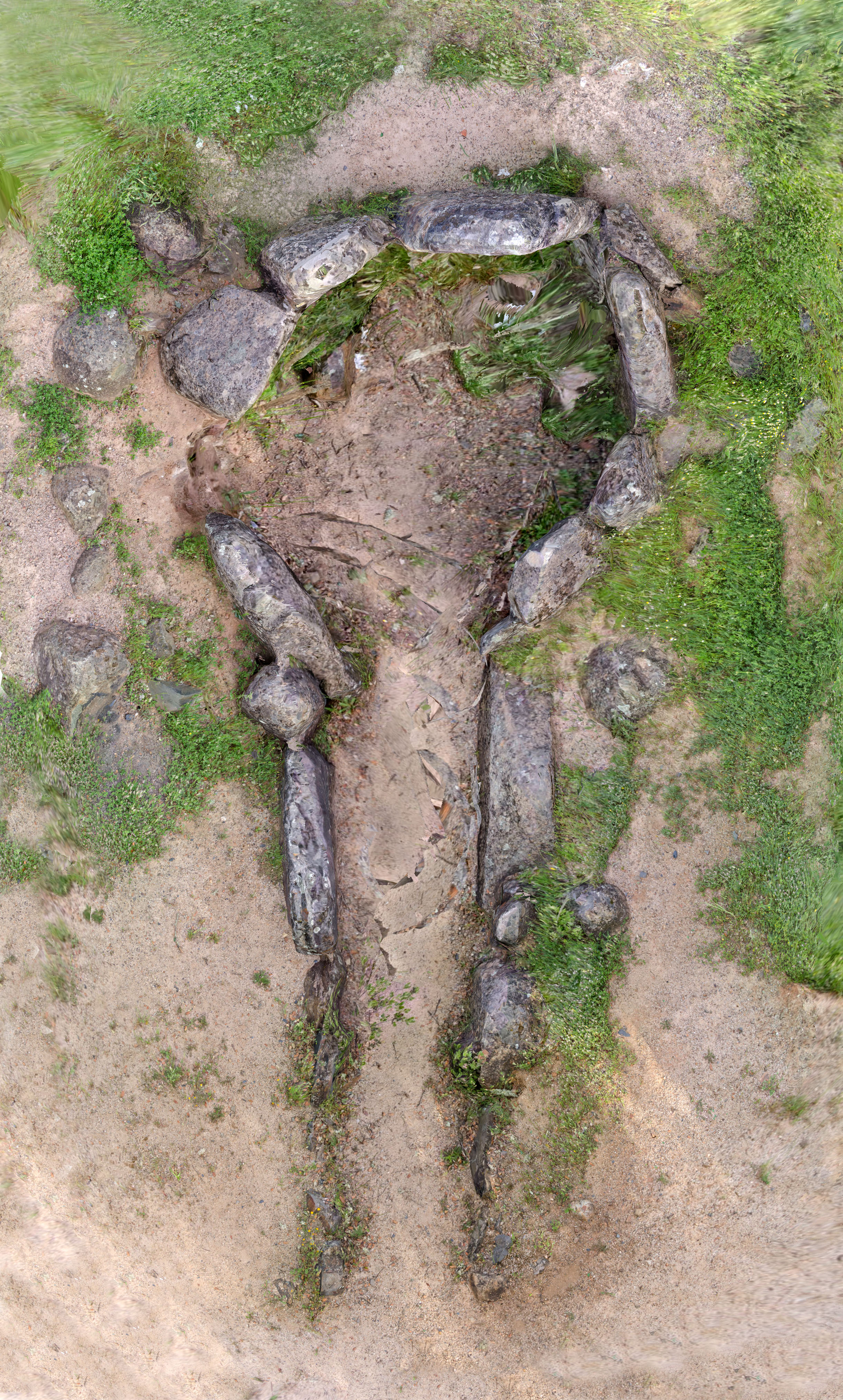 El dolmen de Carmonita es un dolmen con cámara y corredor que ha sufrido saqueos y desmontes de forma que nos ha llegado en un estado mediocre de conservación. La cámara es circular, de unos 3.1 x 2.8 m, definida por diez ortostatos de granito con una altura máxima de unos 2 m. El corredor es de unos 5 m de longitud y está orientado al SE. El túmulo ha desaparecido aunque un trabajo de 1992 menciona abundantes restos dispersos. Esta imagen a vista de pájaro no está hecha desde donde aparenta sino que es una fusión de 30 fotografías tomadas a nivel del suelo. Hay un modelo 3D en skfb.ly/PSOB